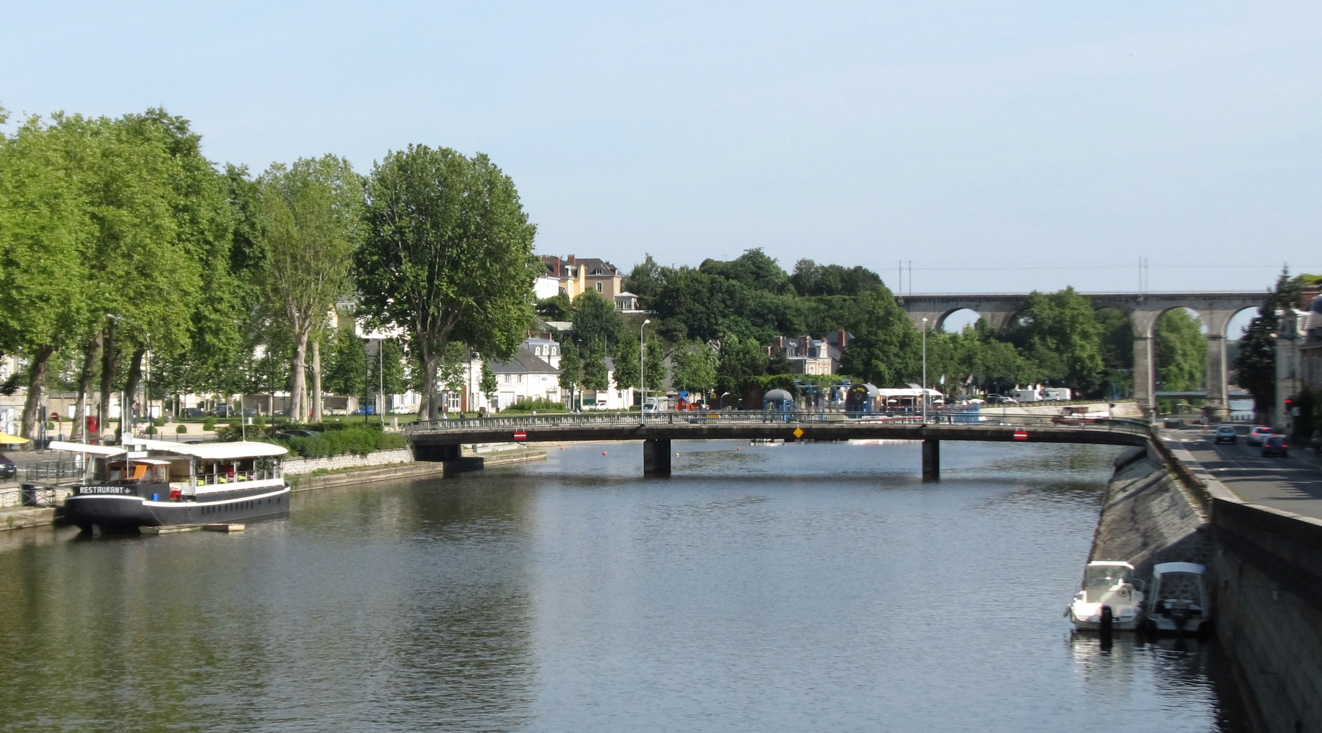 Pont de l'Europe, Laval, Mayenne, France